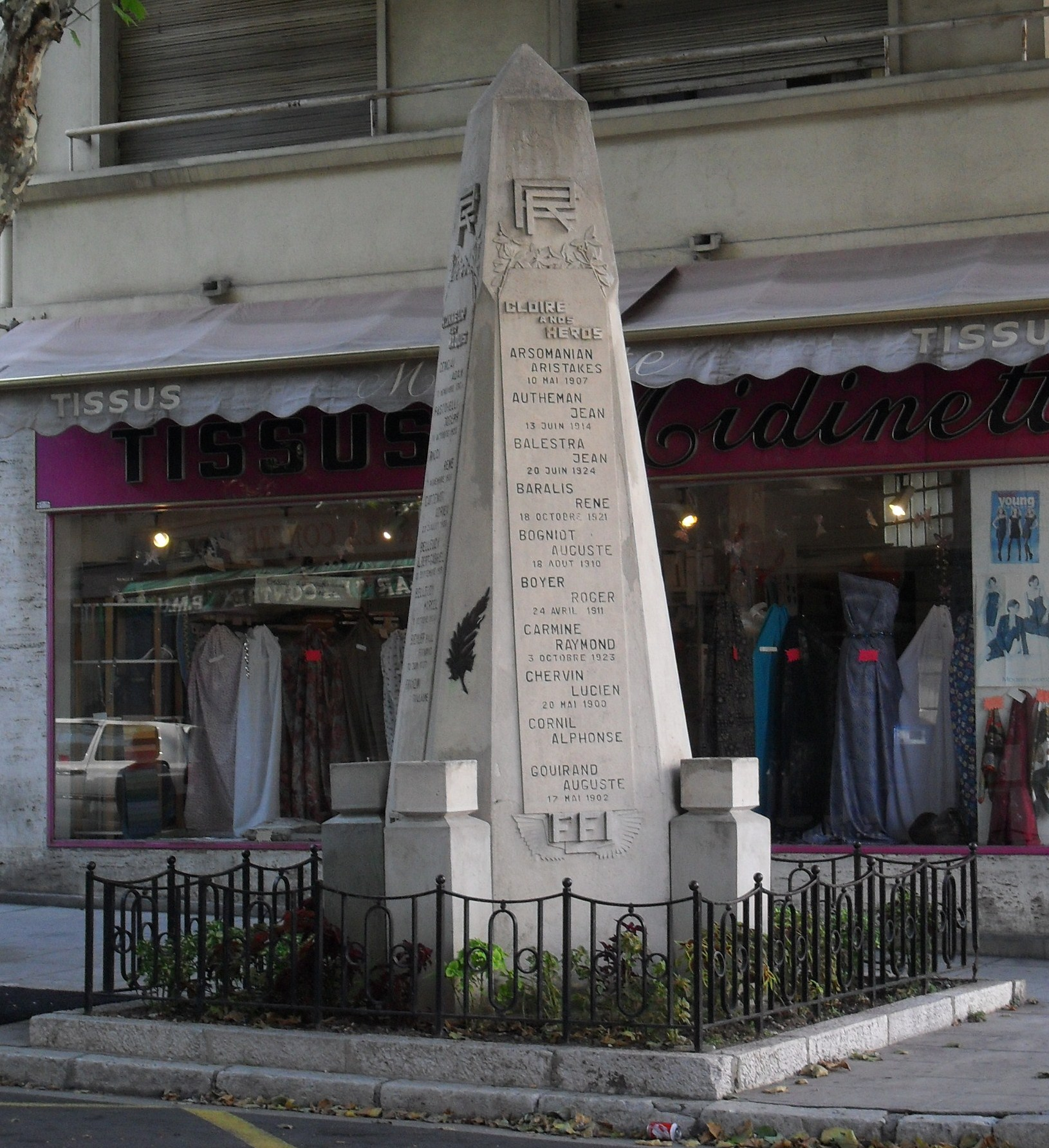 Monument commémoratif (cénotaphe) commémorant la Libération de Nice et situé à l'angle du carrefour du 28 août et du boulevard Joseph Garnier. On y trouve 27 noms de résistants (résistants décédés en déportation, maquisards tués, résistants tués dans le cadre des combats du 28 août 1944).